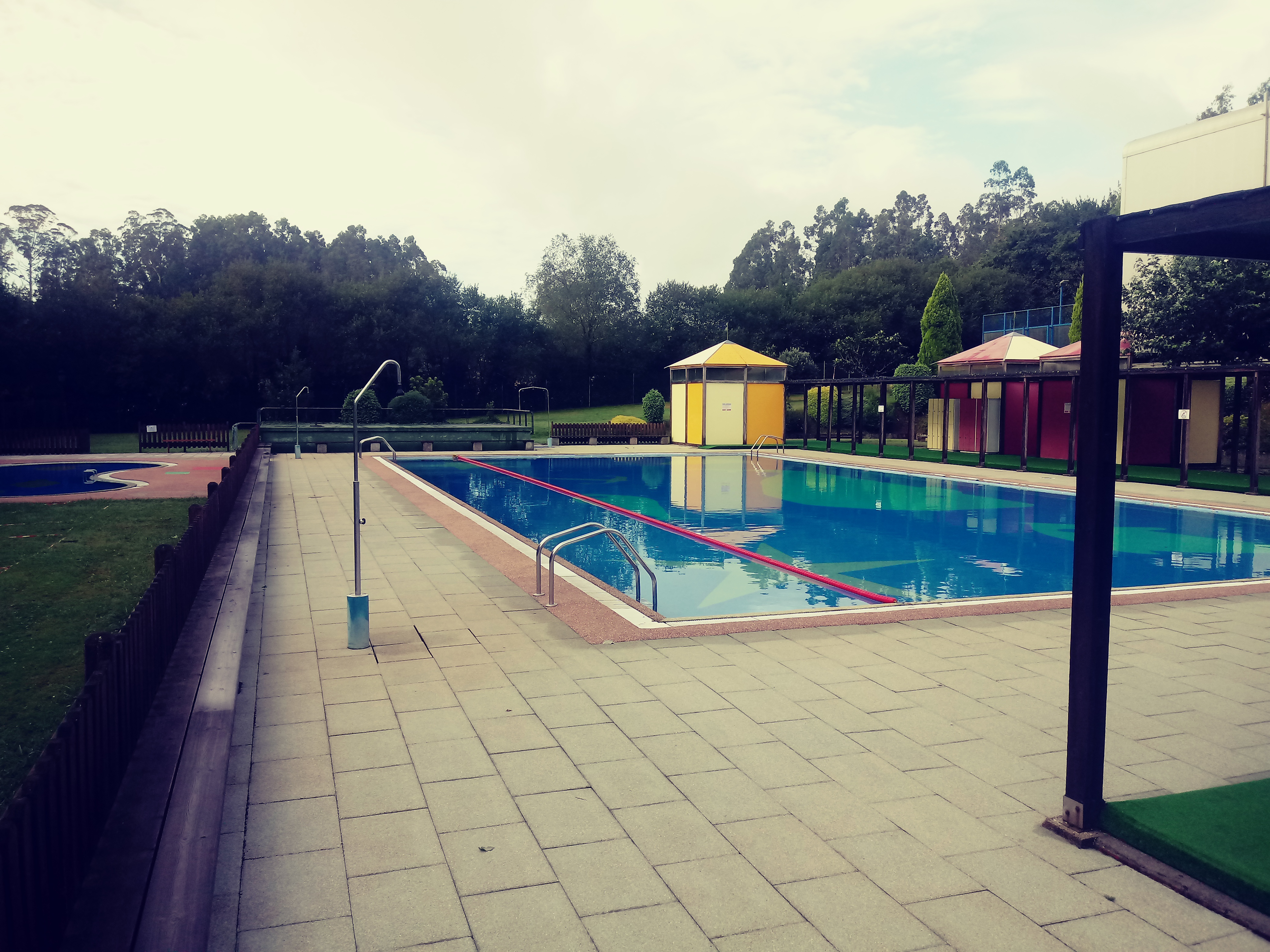 Instalacións da piscina municipal de Lameiro, no Pedrouzo. Conta cunha piscina para adultos e outra para nenos.